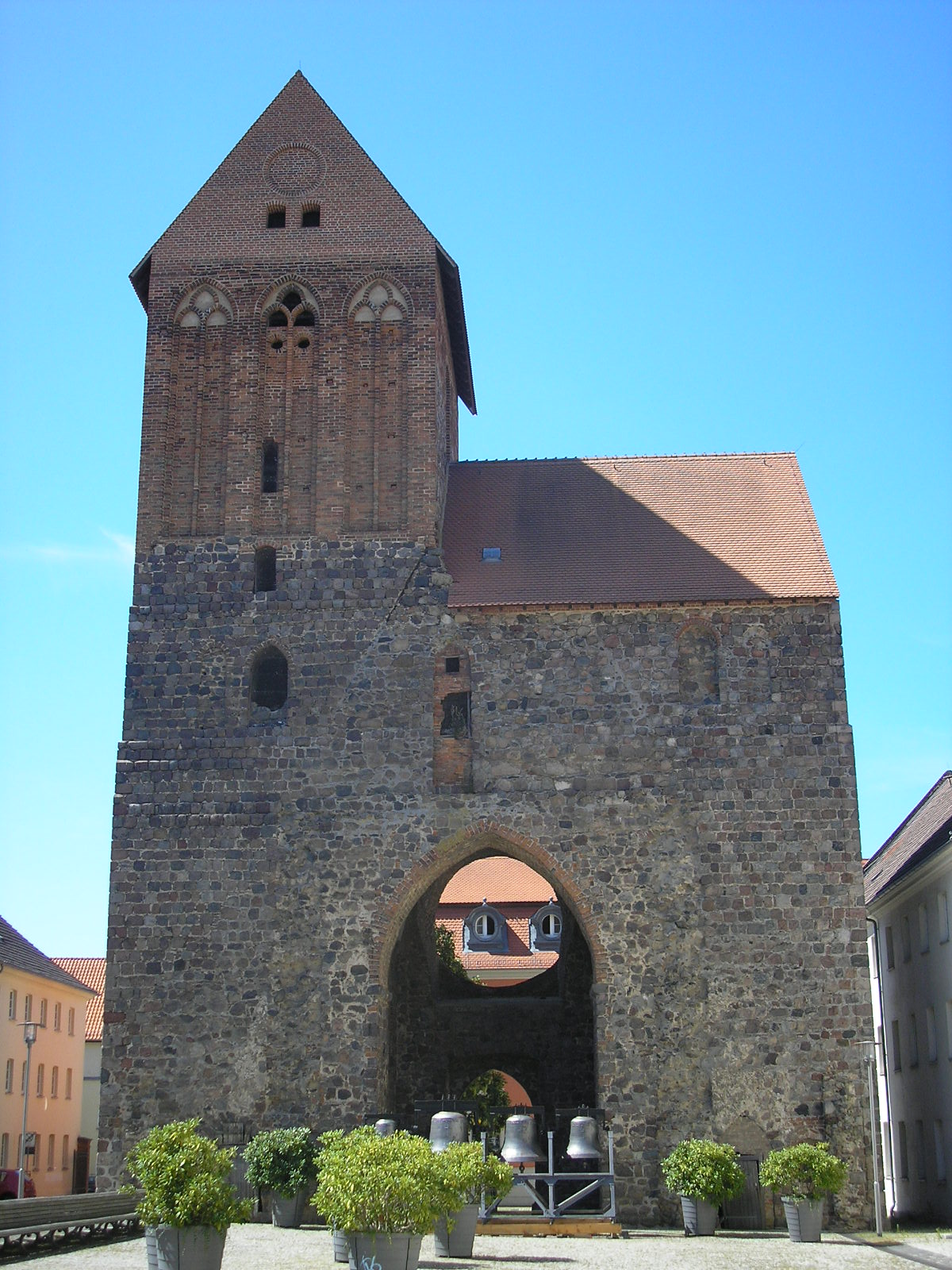 Die Nikolaikirche in Prenzlau (Brandenburg).